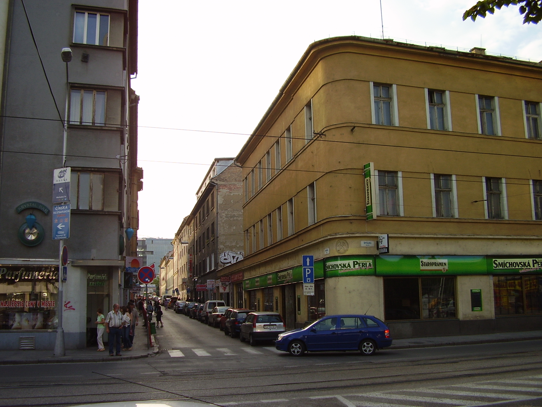 Bratislava